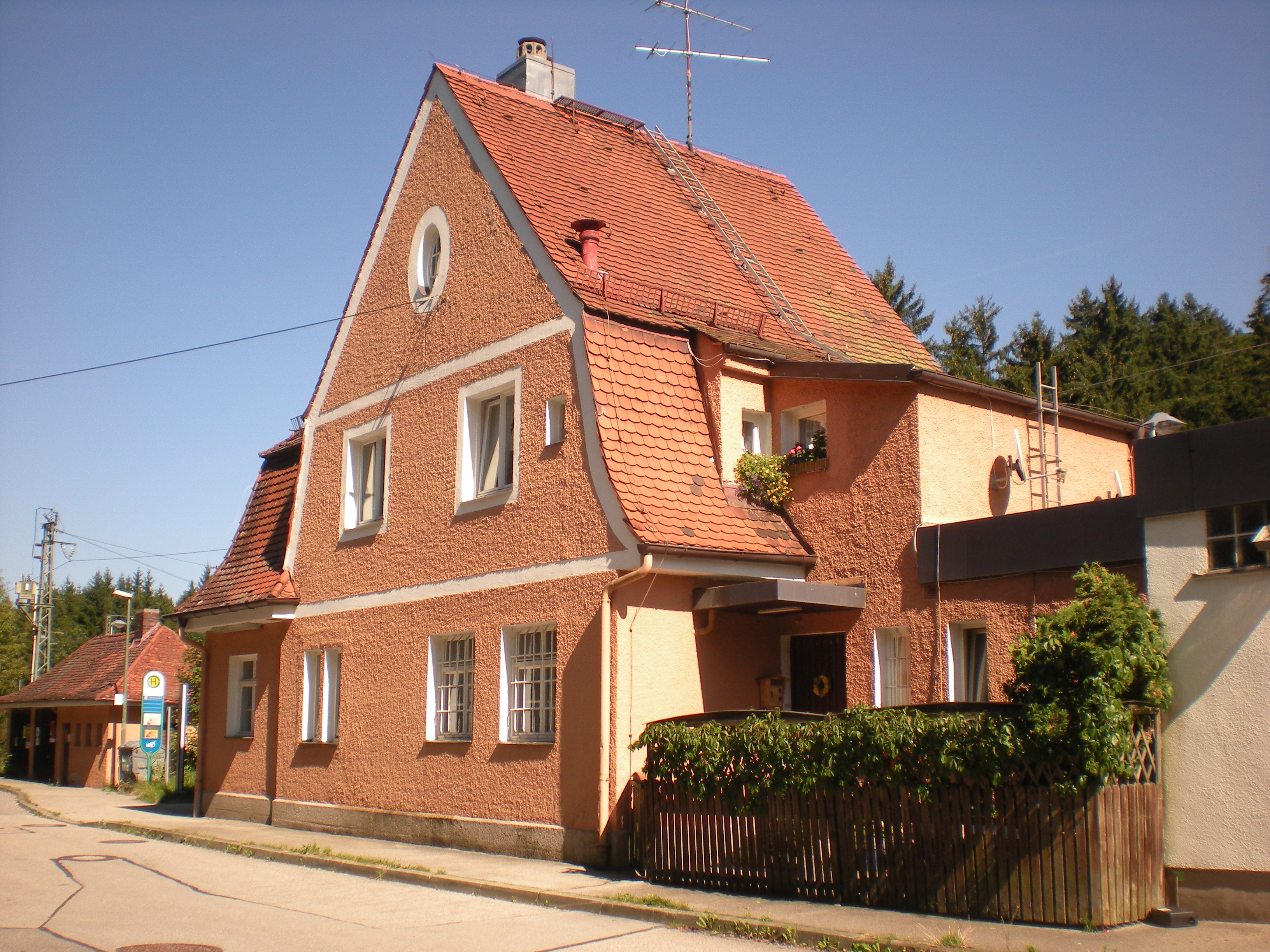 Empfangsgebäude des Bahnhofs Kreuzstraße von der Straßenseite